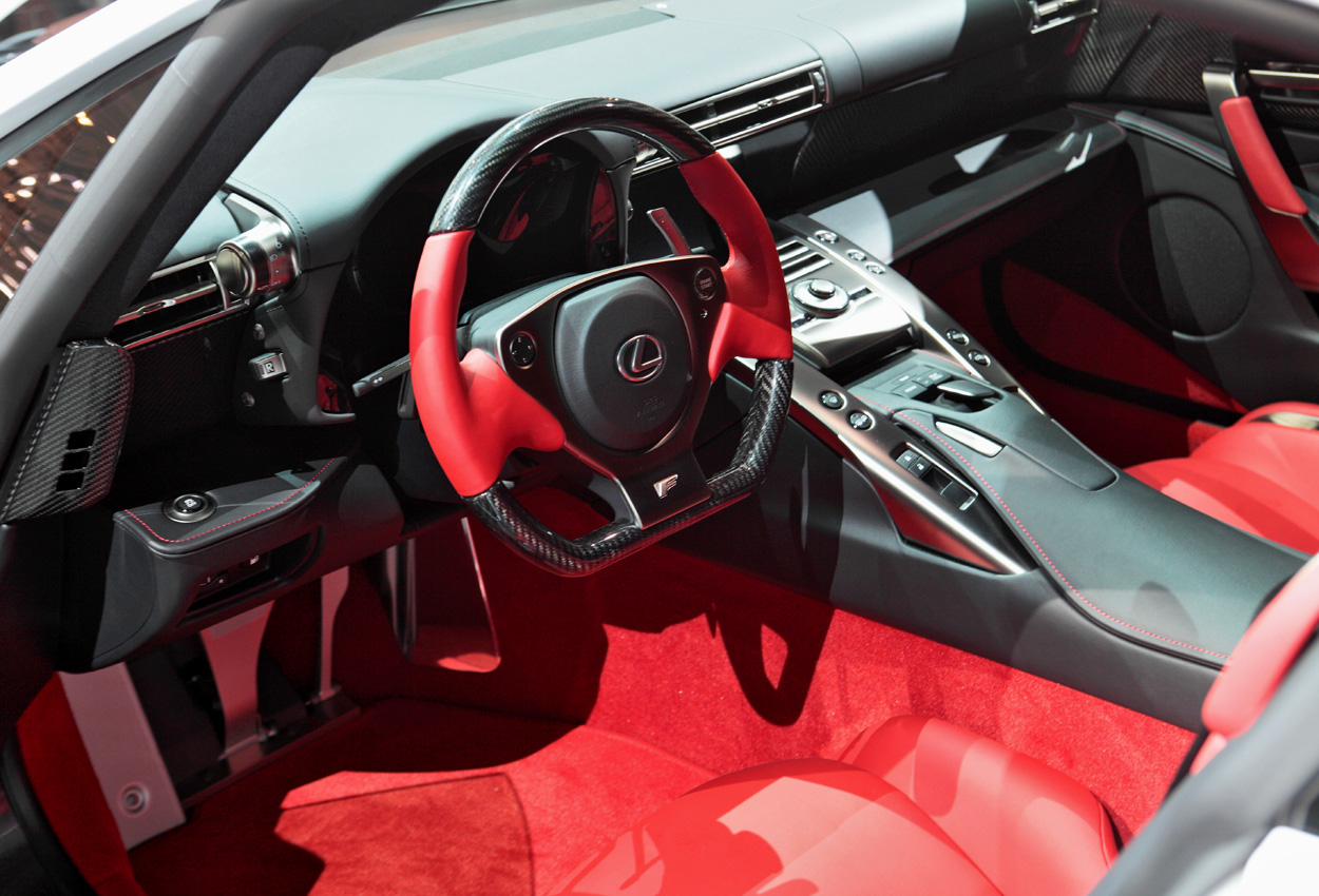 Lexus LFA.